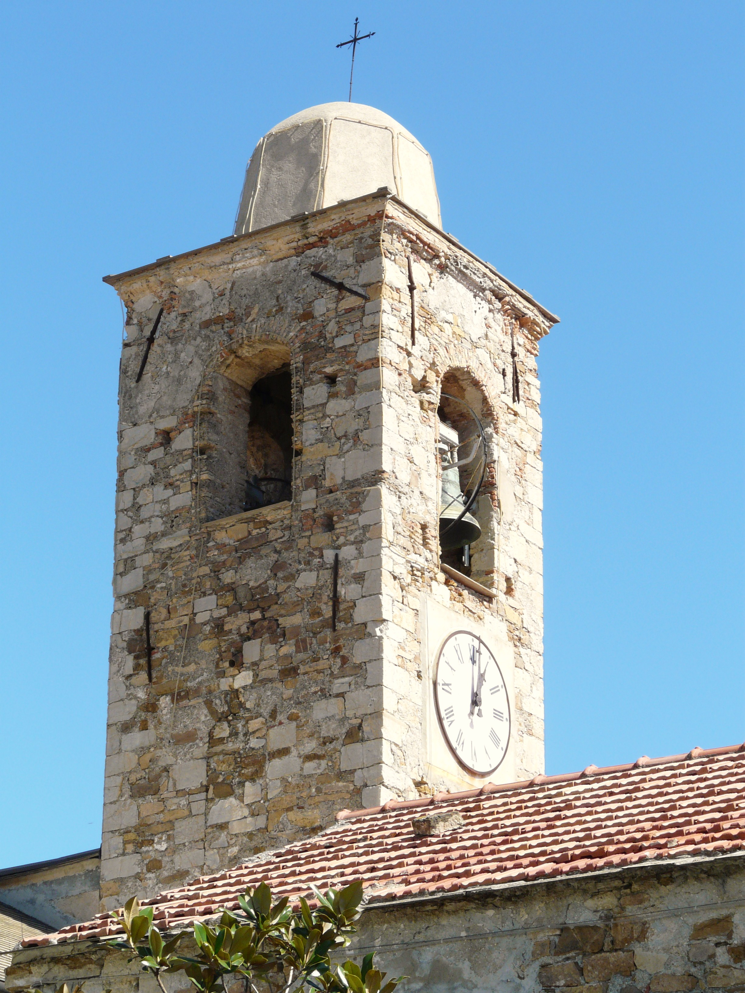 Chiesa della Natività di Maria Vergine, Lingueglietta, Cipressa, Liguria, Italia